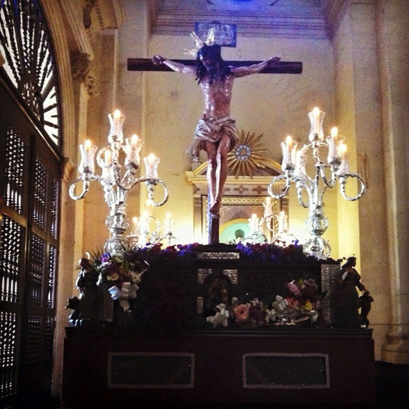 Cristo del Perdón